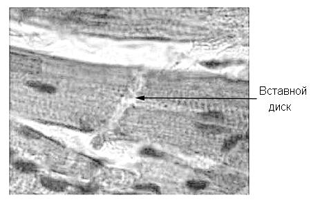 Ткань сердечной мышцы. Обозначен так. наз."вставной диск", образованный адгезионными контактами с десмосомами